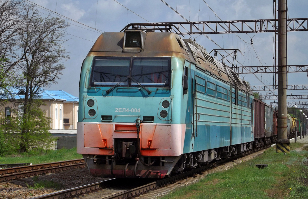 Електровоз 2ЕЛ4-004 з вантажним поїздом. Україна, Дніпропетровська область, станція Ароматна